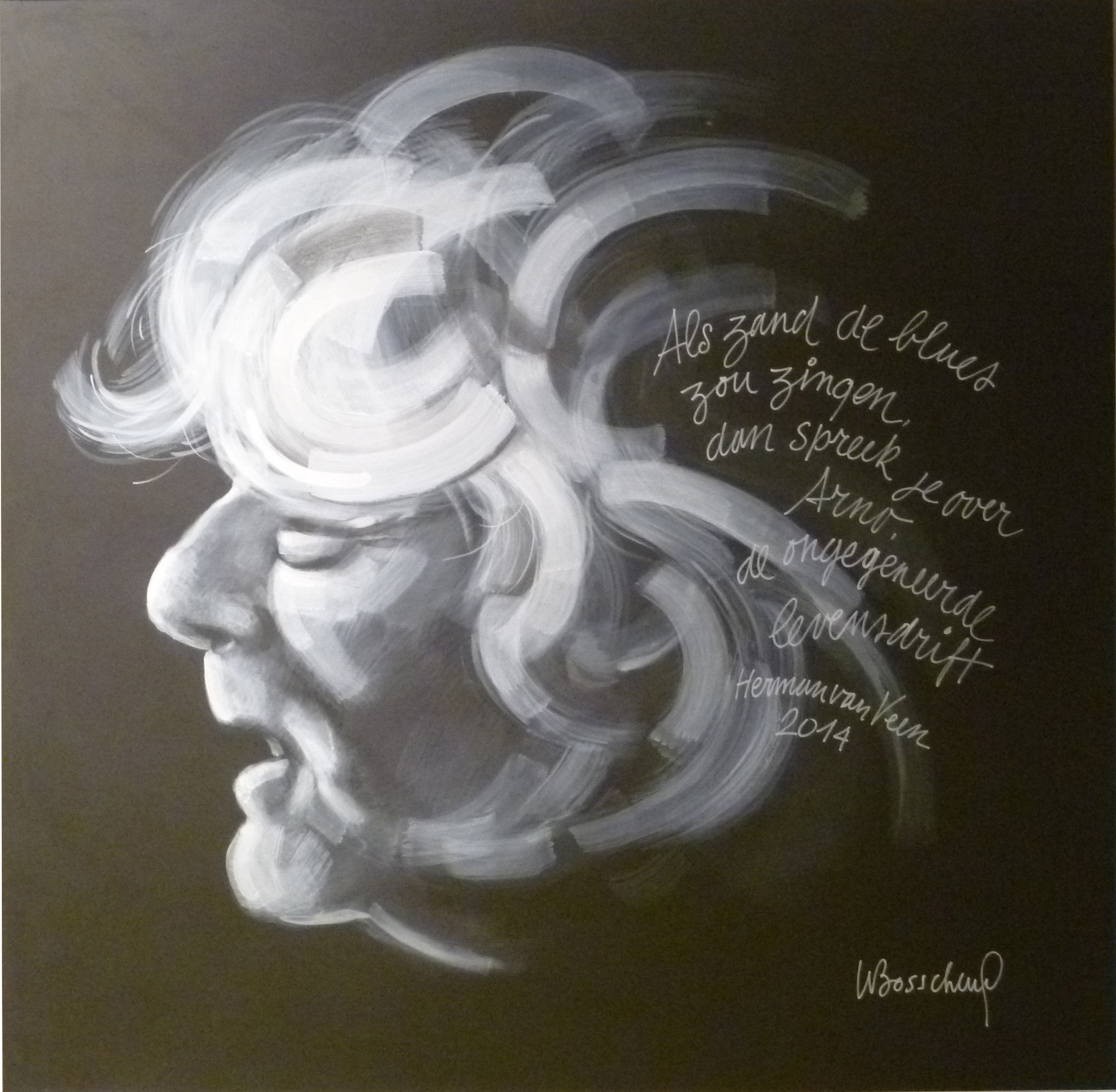 "Arno Hintjes - Sandblues" (2014) acryl op paneel (100 x 100 cm) door de Belgische kunstschilder Willy Bosschem